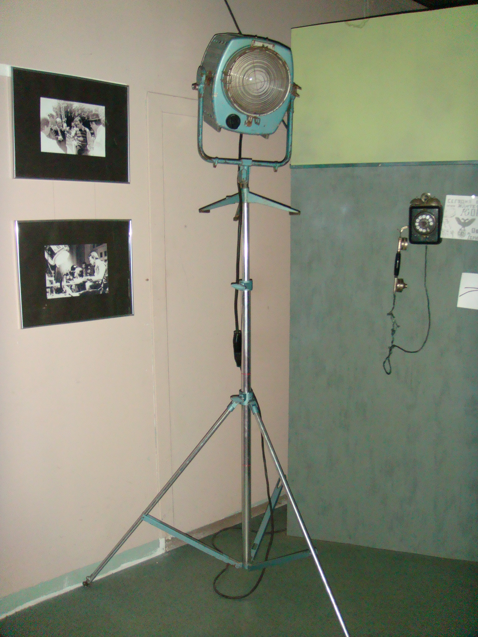 Одесский музей кино. Предметы быта на столе Жеголова, записки, документы + камера и осветительная техника, которые принимали участие в съемках фильма "Место встречи изменить нельзя". Съёмочный павильон №5.